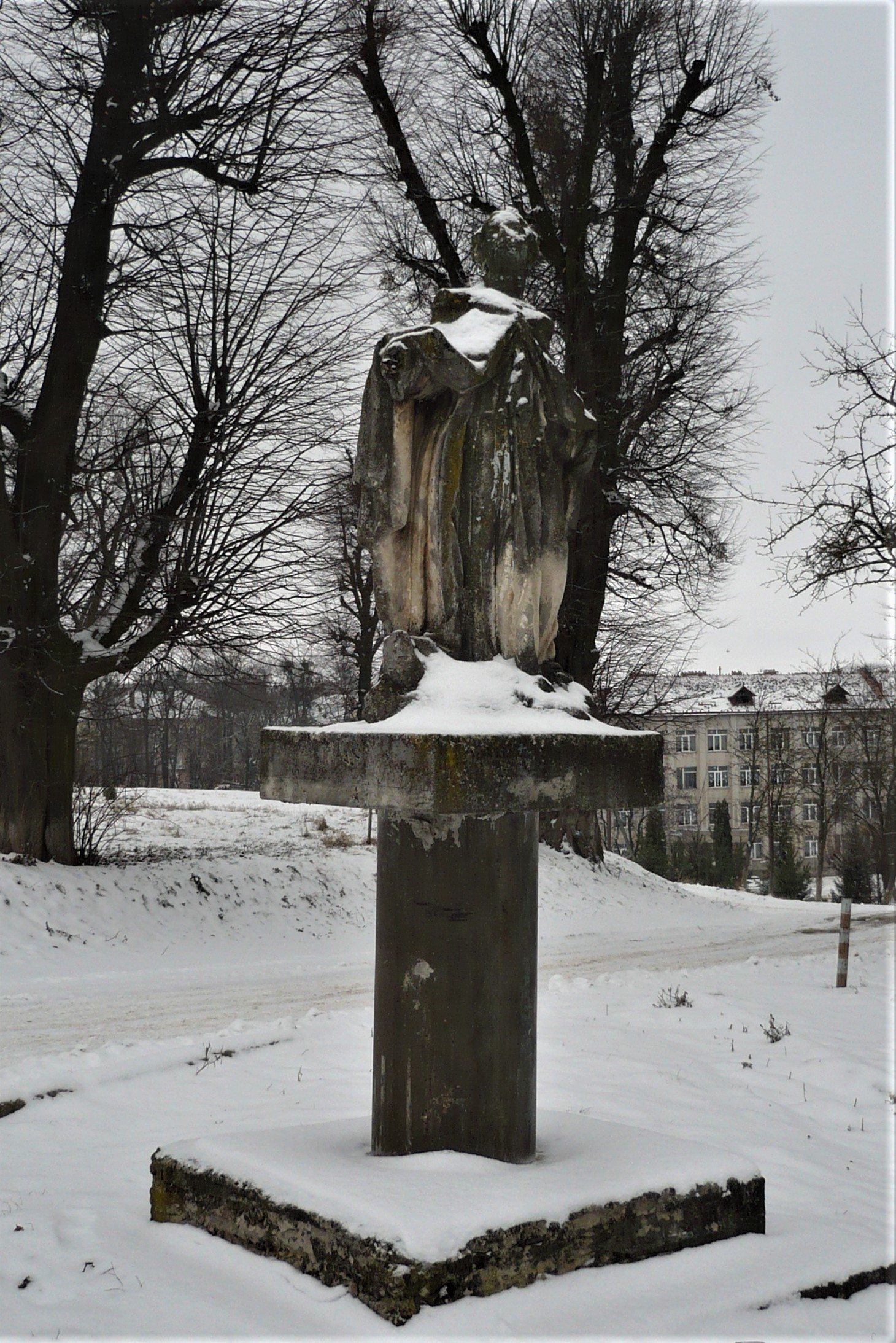 Zamek